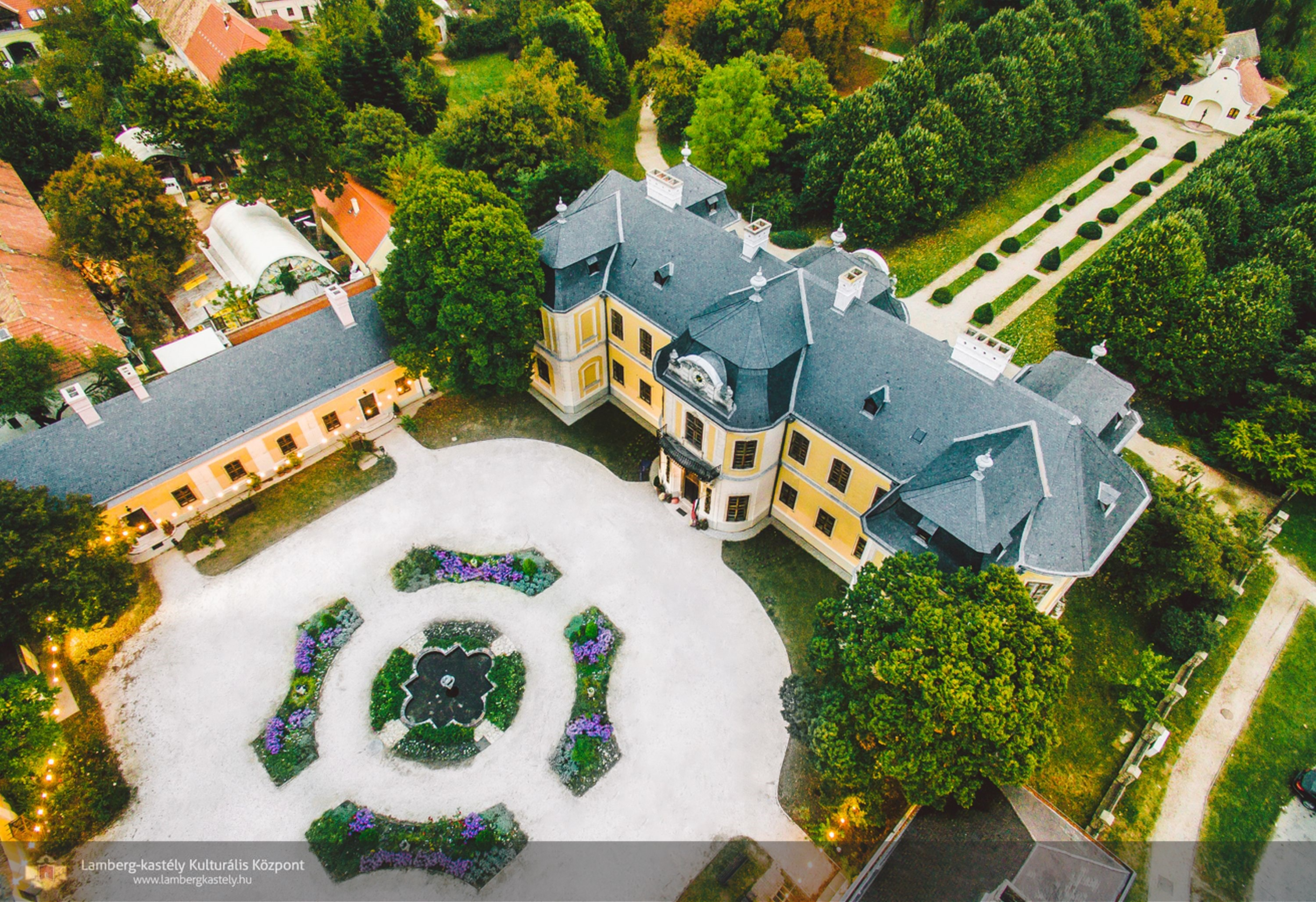 A Lamberg-kastély madártávlatból, a belső udvarral és a kastélyparkkal